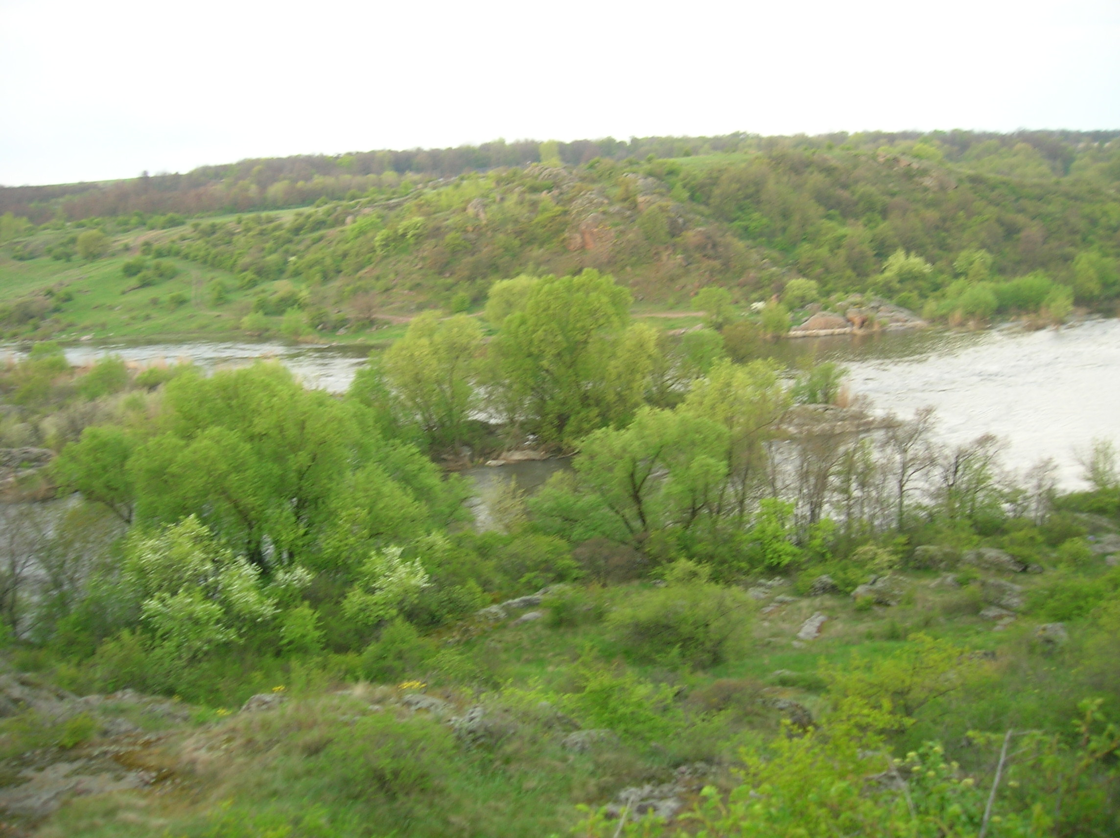 river Yujniy Bug